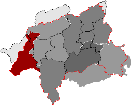 Lage der Stadt Vohwinkel vor ihrer Vereinigung 1929 zu Wuppertal